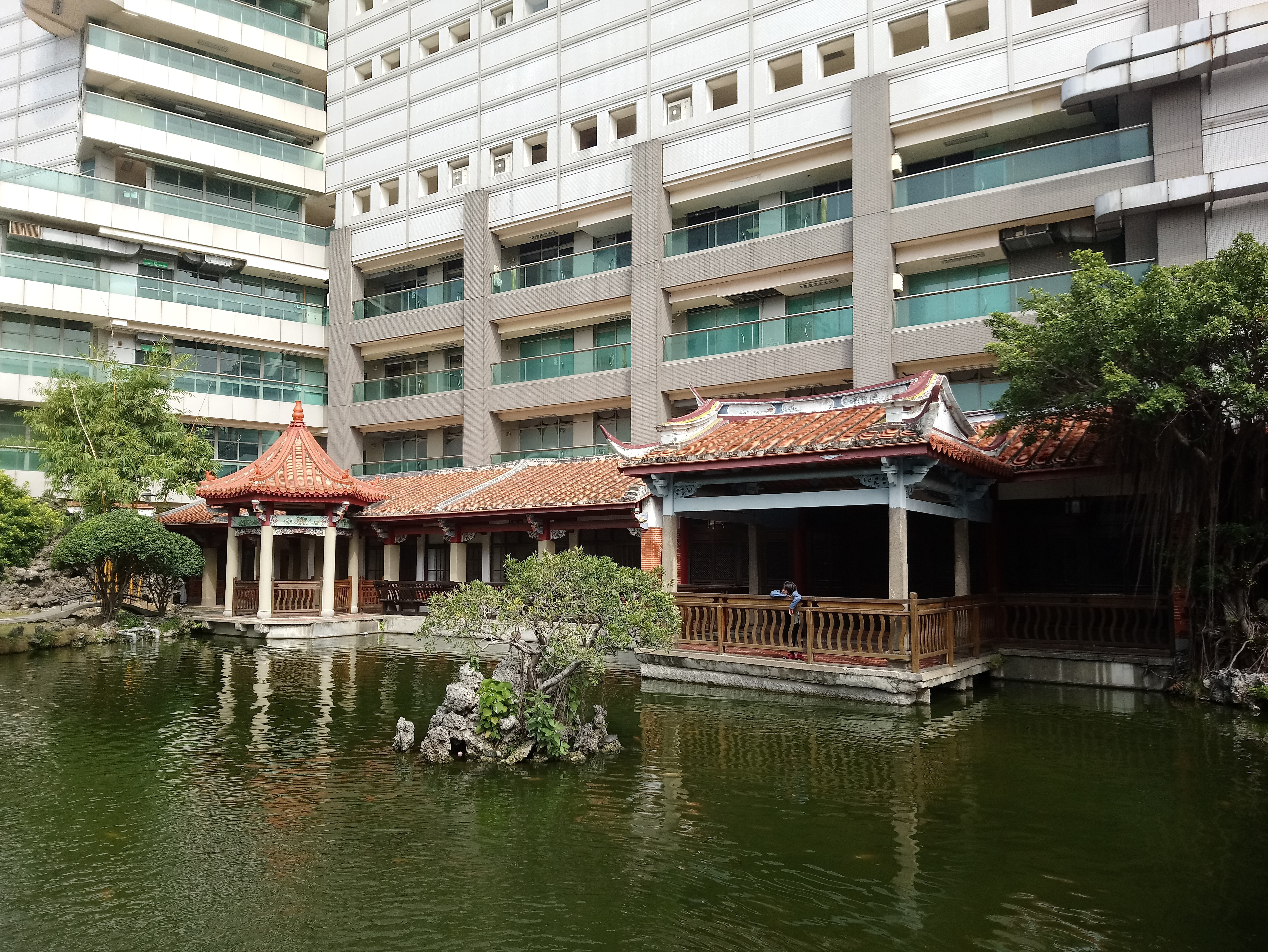 吳園（紫春園）水榭,臺南市中西區赤崁里